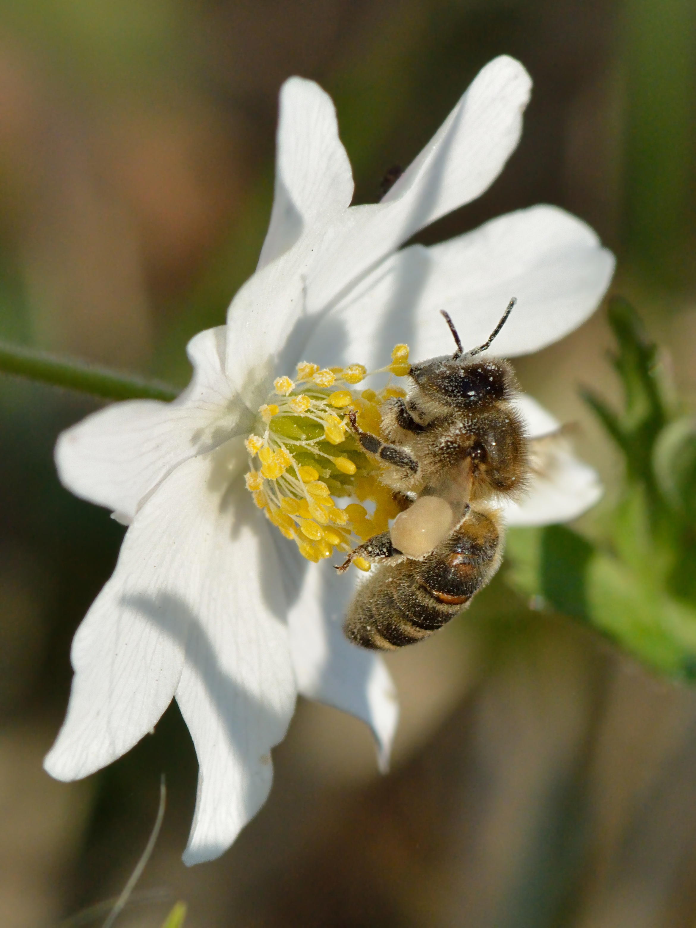 Meemesilane võsaülaselt õietolmu kogumas. Keila, Loode-Eesti.